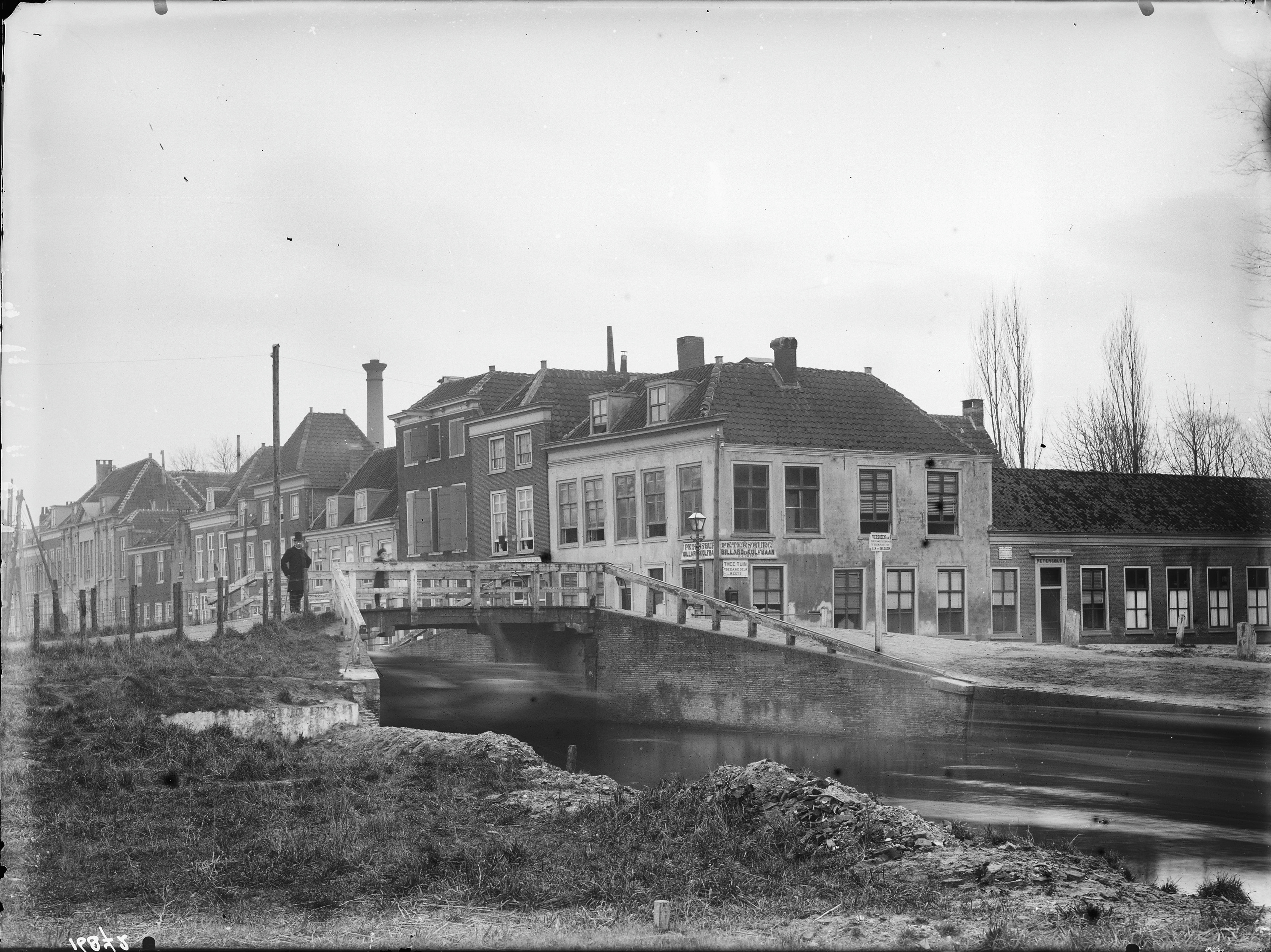 Geestbrug